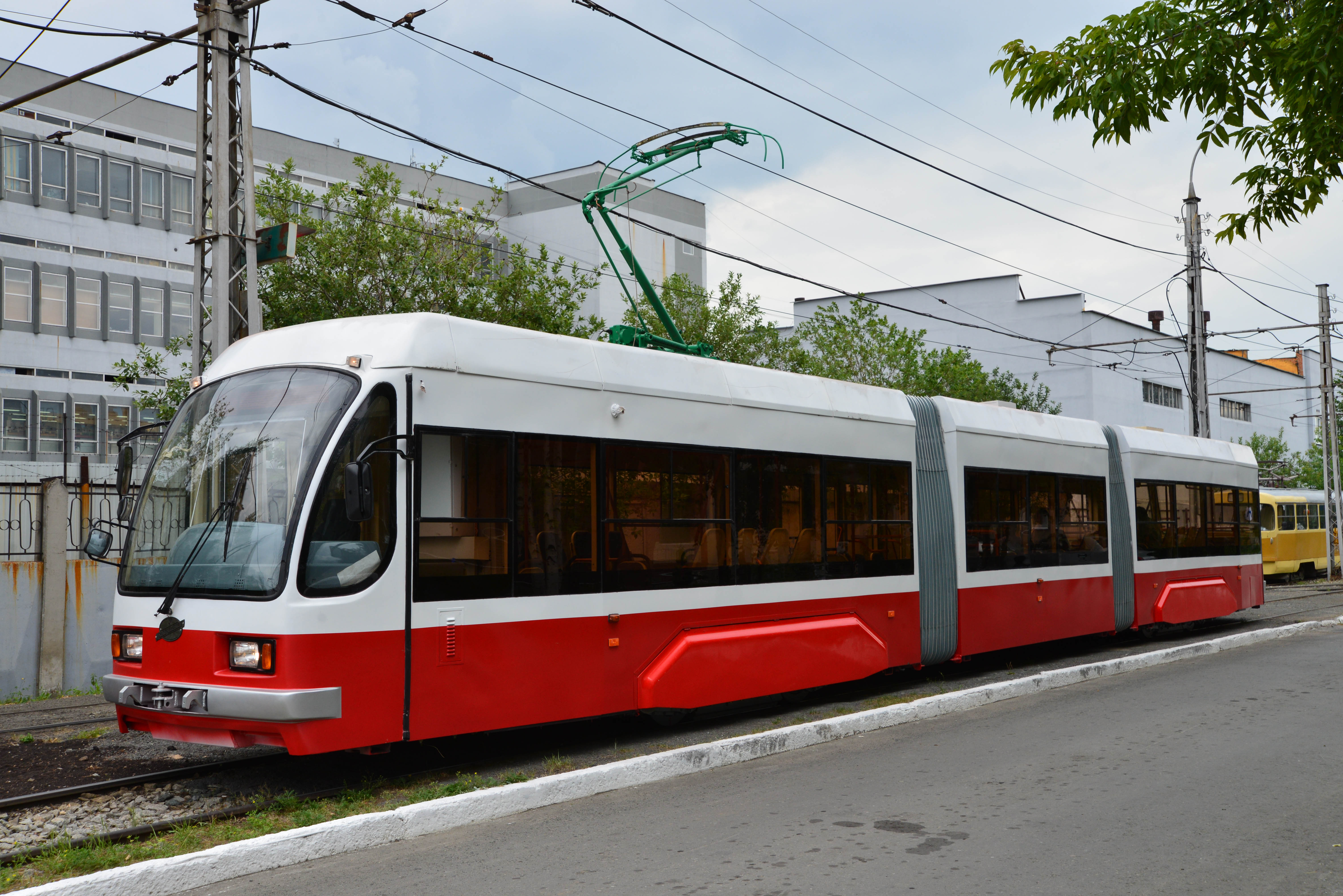 Трамвайный вагон 71-409